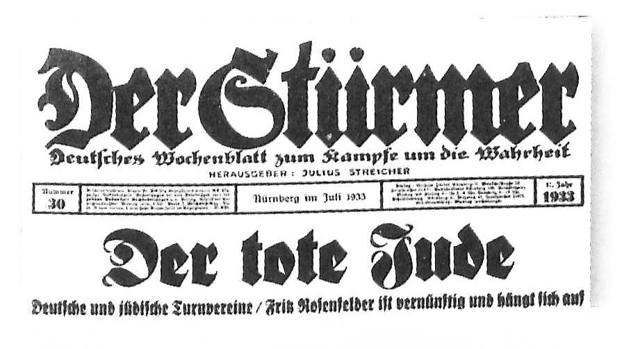 Der Stürmer, Nr. 30, Juli 1933, S. 1 Schlagzeile Die Karikatur von Philipp Rupprecht ist aus urheberrechtlichen Gründen abgedeckt, sie bezieht sich nicht auf den Leitartikel über Fritz Rosenfeld.